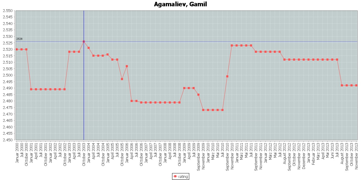 Агамалиев, Джамиль (род. 1974) — азербайджанский шахматист, гроссмейстер (2002).